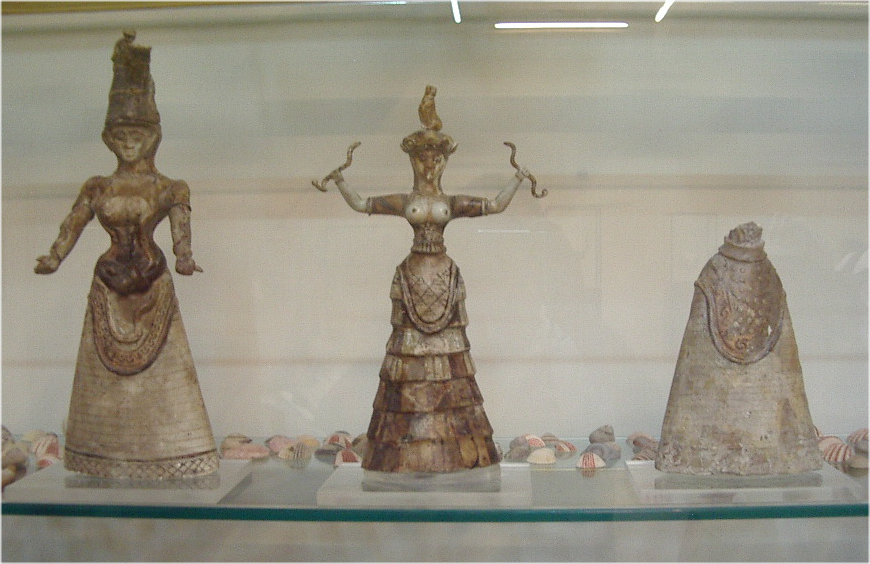 objectes trobats a Cnossos, foto pròpia